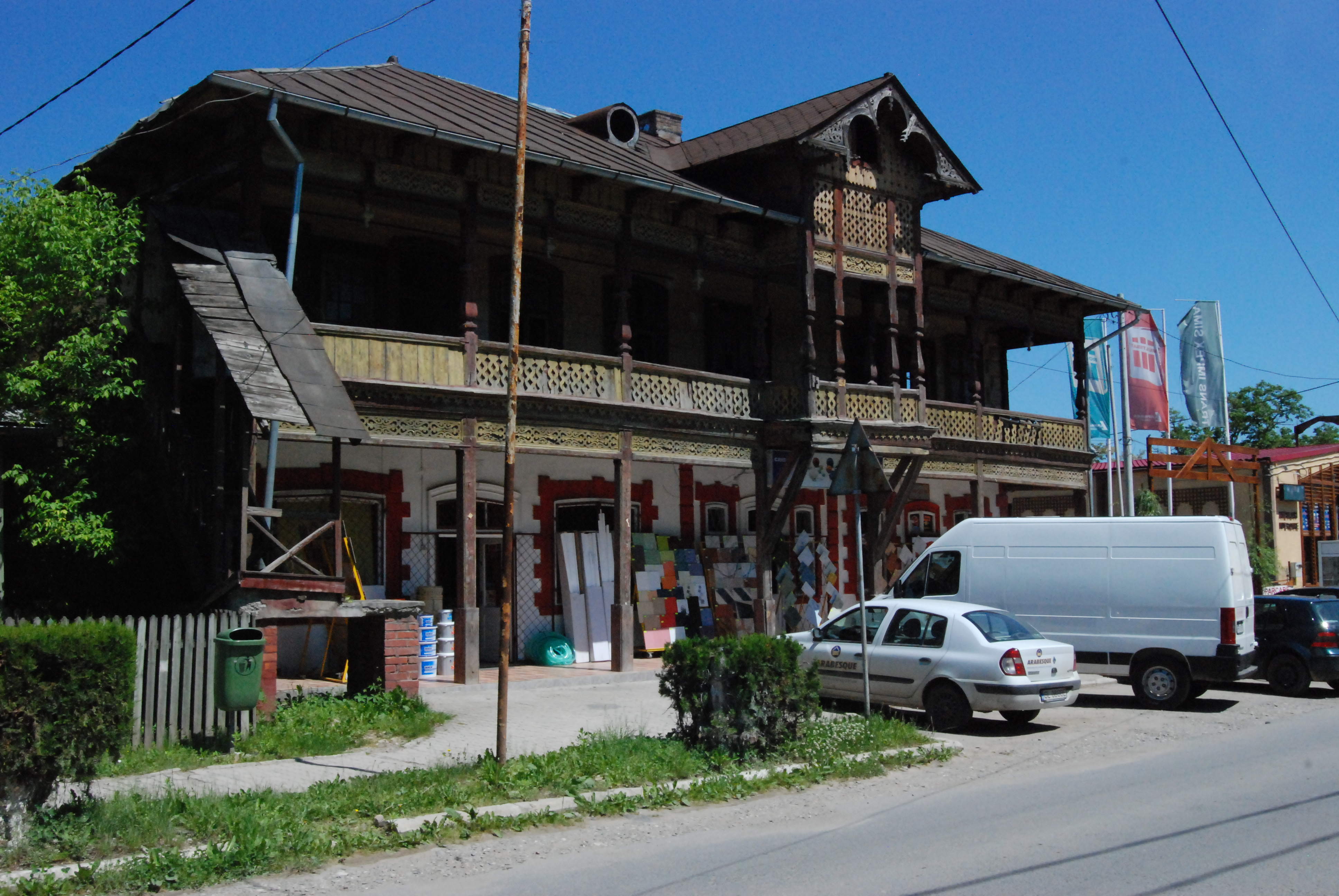 Casa Alexandru Bondoc din Breaza de Sus - vedere faţadă